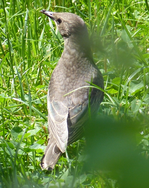 Star diesjährig